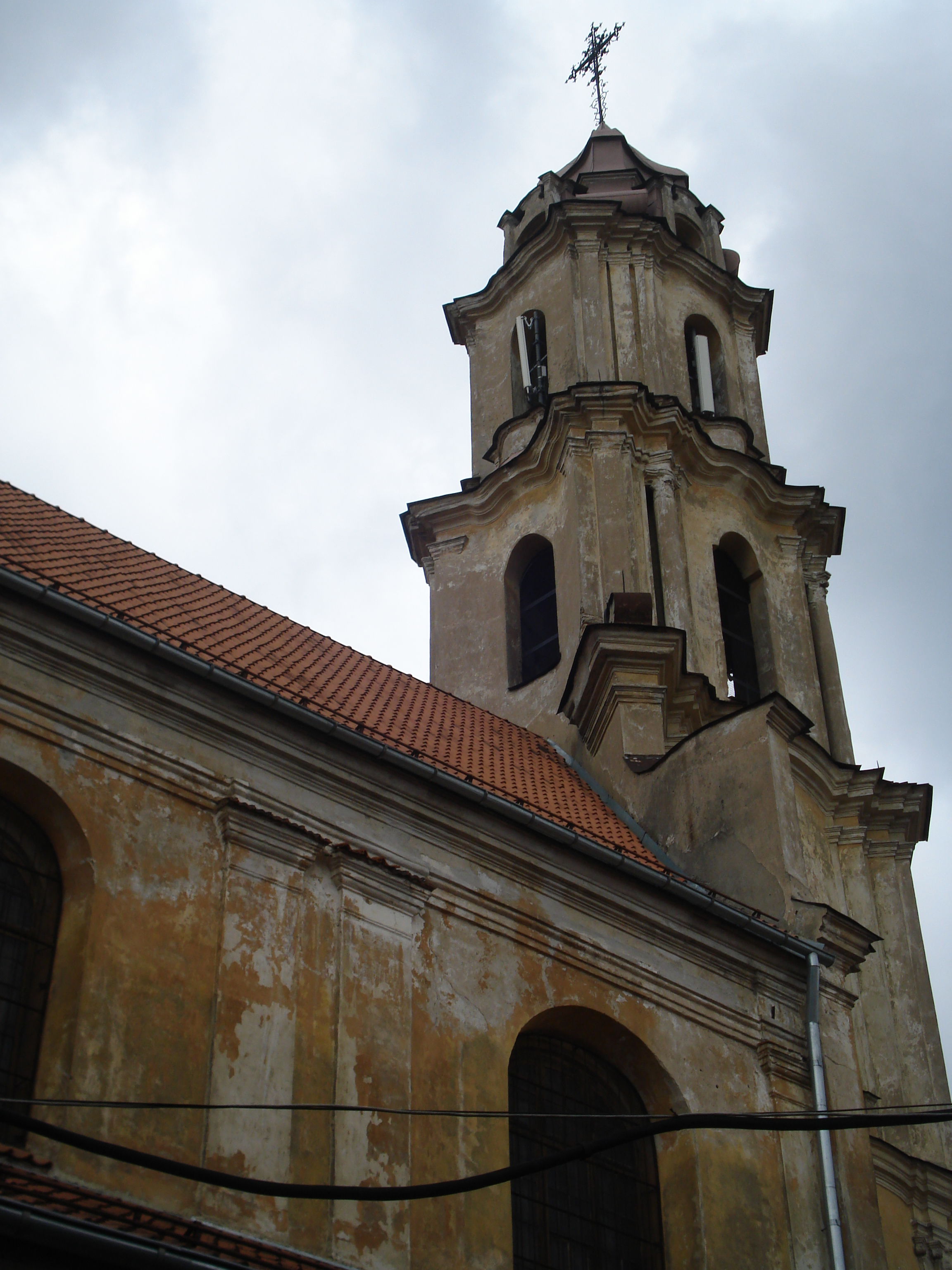 Church of Blessed Virgin Mary (Švč. Mergelės Marijos Ramintojos bažnyčia) in Vilnius (Savičiaus g. 13/2; closed)